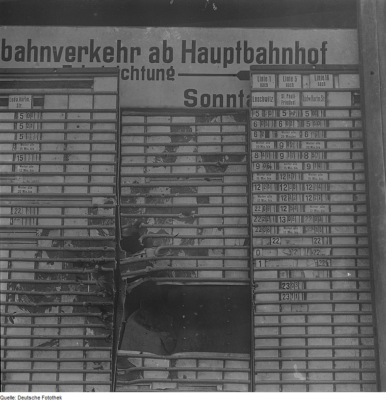 Original image description from the Deutsche Fotothek Zerstörter Straßenbahnfahrplan am Hauptbahnhof